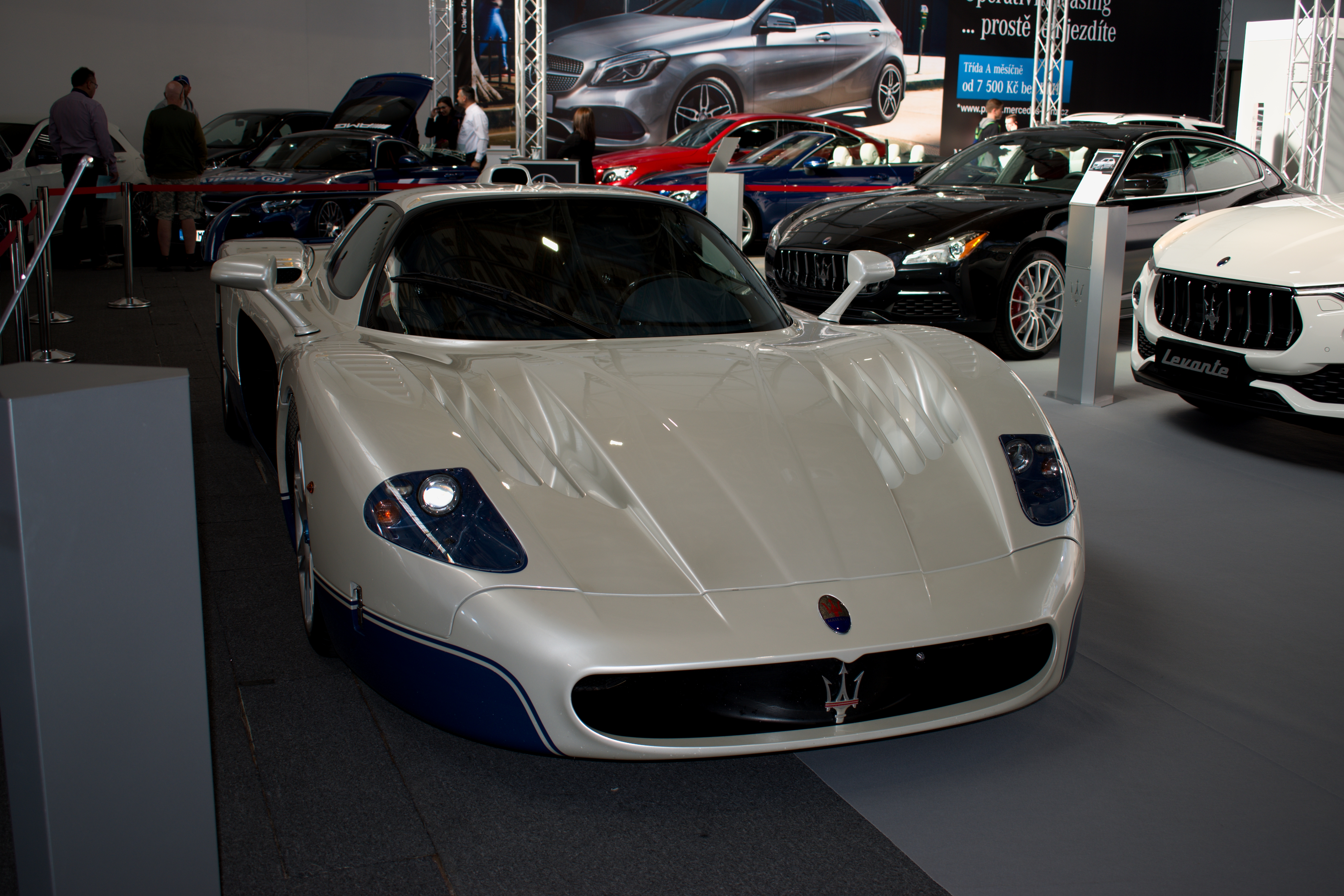 Autoshow Praha 2016 22.9.2016; Autor: Jiří Borový pro IZdoprava.cz